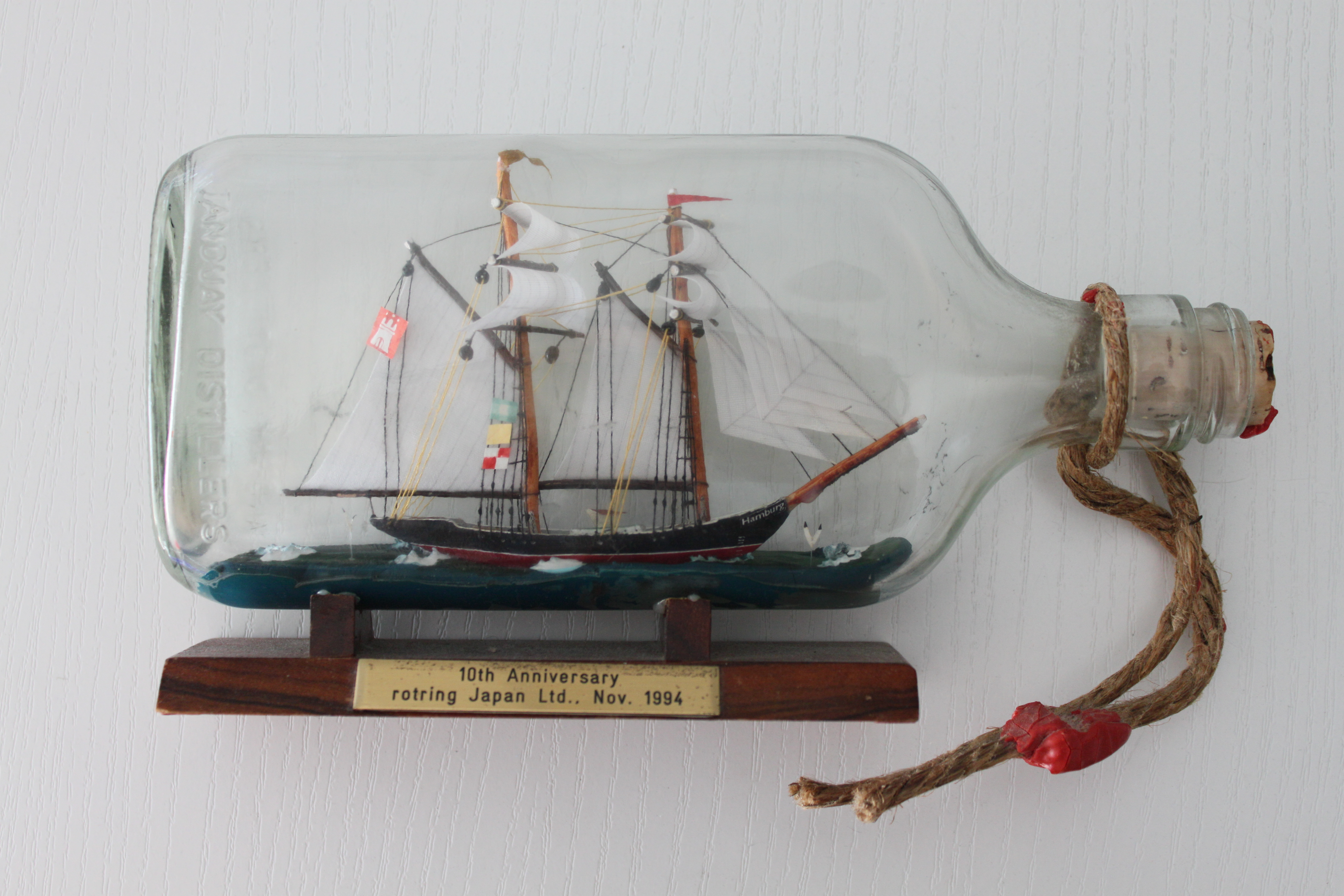 Buddelschiff